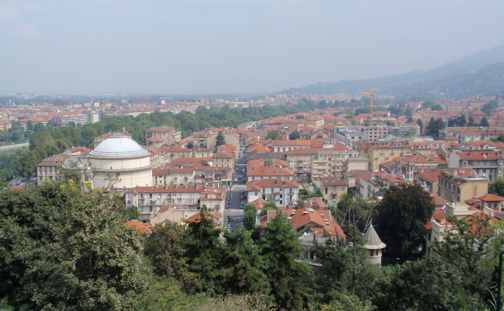 Veduta di Borgo Po Torino Italia